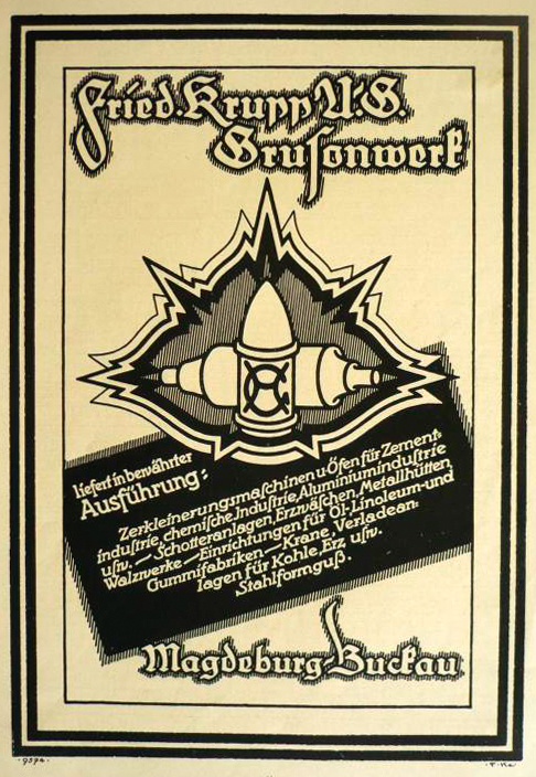 Fried. Krupp AG Grusonwerk, historische Werbeschrift